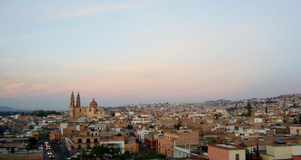 Lagos de Moreno, Jalisco, México.